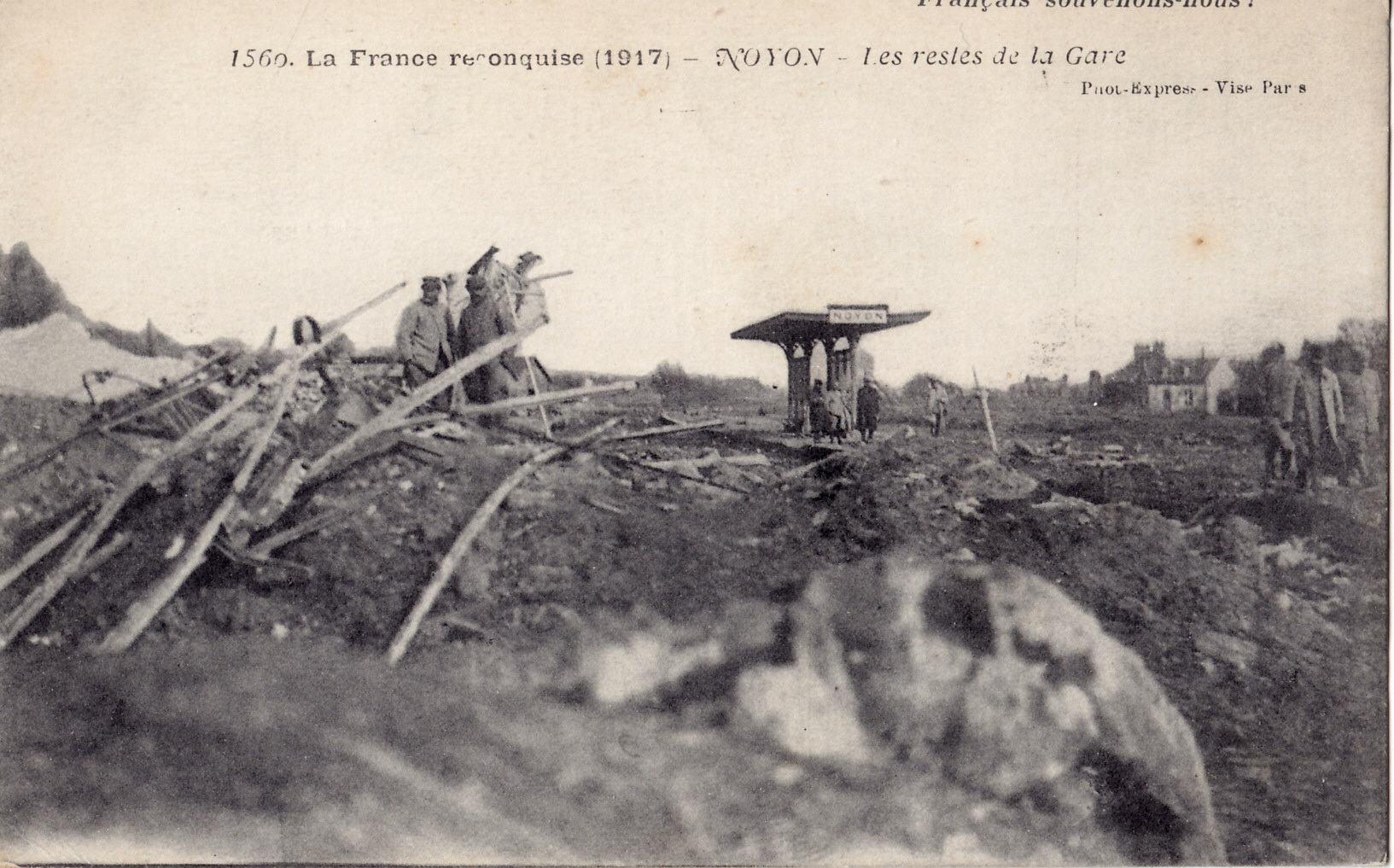 Carte postale ancienne éditée par Phot-Express 1560, collectionFrançais souvenons-nous - La France reconquise (1917 : NOYON - Les restes de la Gare.Mention de censure "Visé Paris"